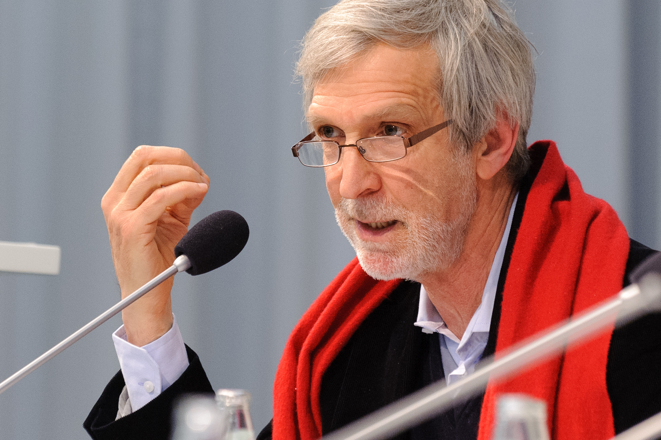 Shimon Stein (ehemaliger Botschafter des Staates Israel in Deutschland) Konferenz: Fremde Freunde?